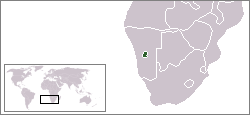 Description:Carte de localisation du bantoustan du Rehoboth, Namibie Auteur:Rémih